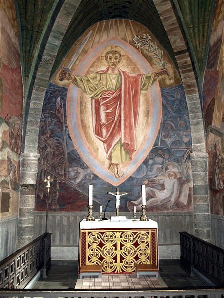 Stiklestad kirke